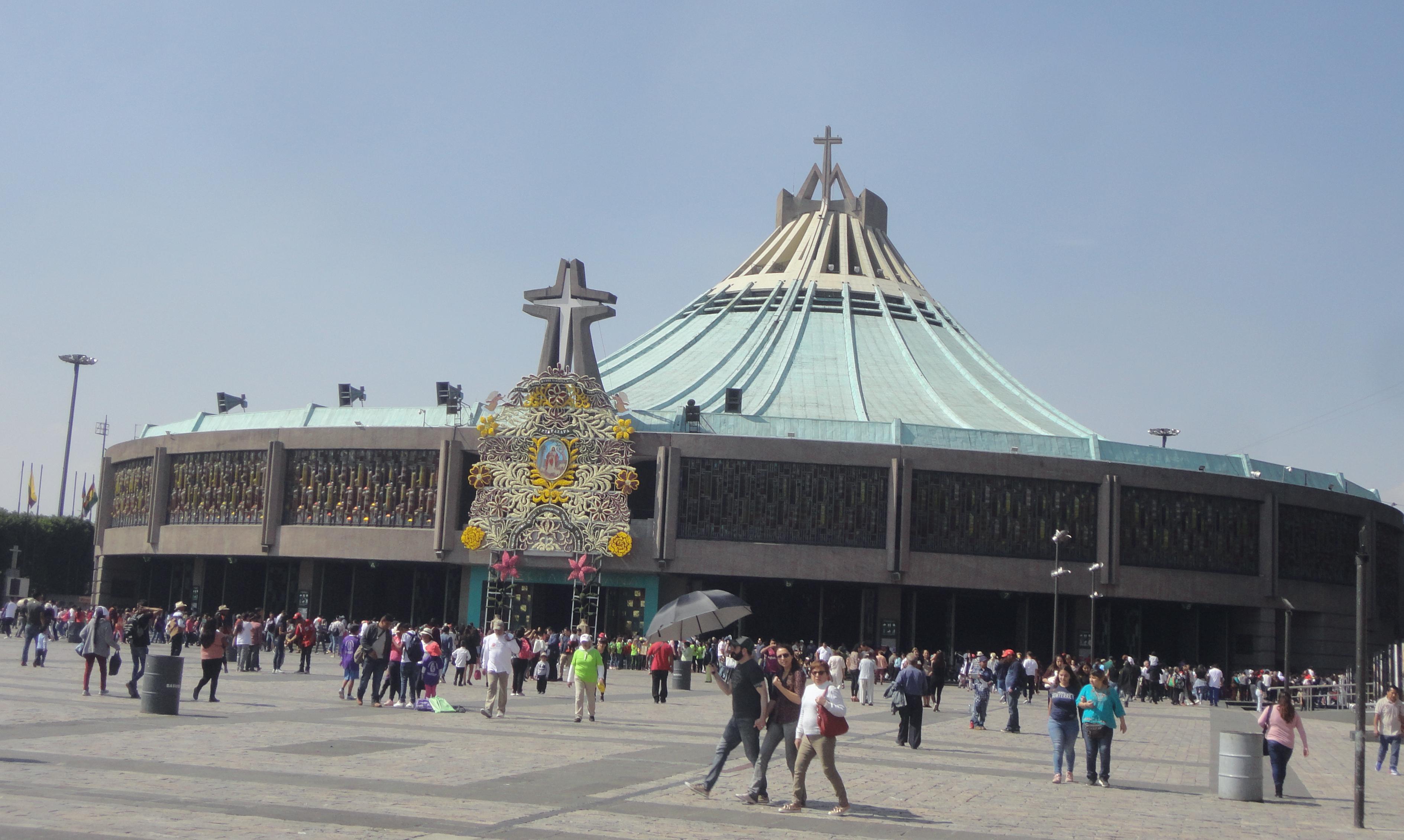 Nueva Basílica de Nuestra Señora de Guadalupe, Ciudad de México, México.